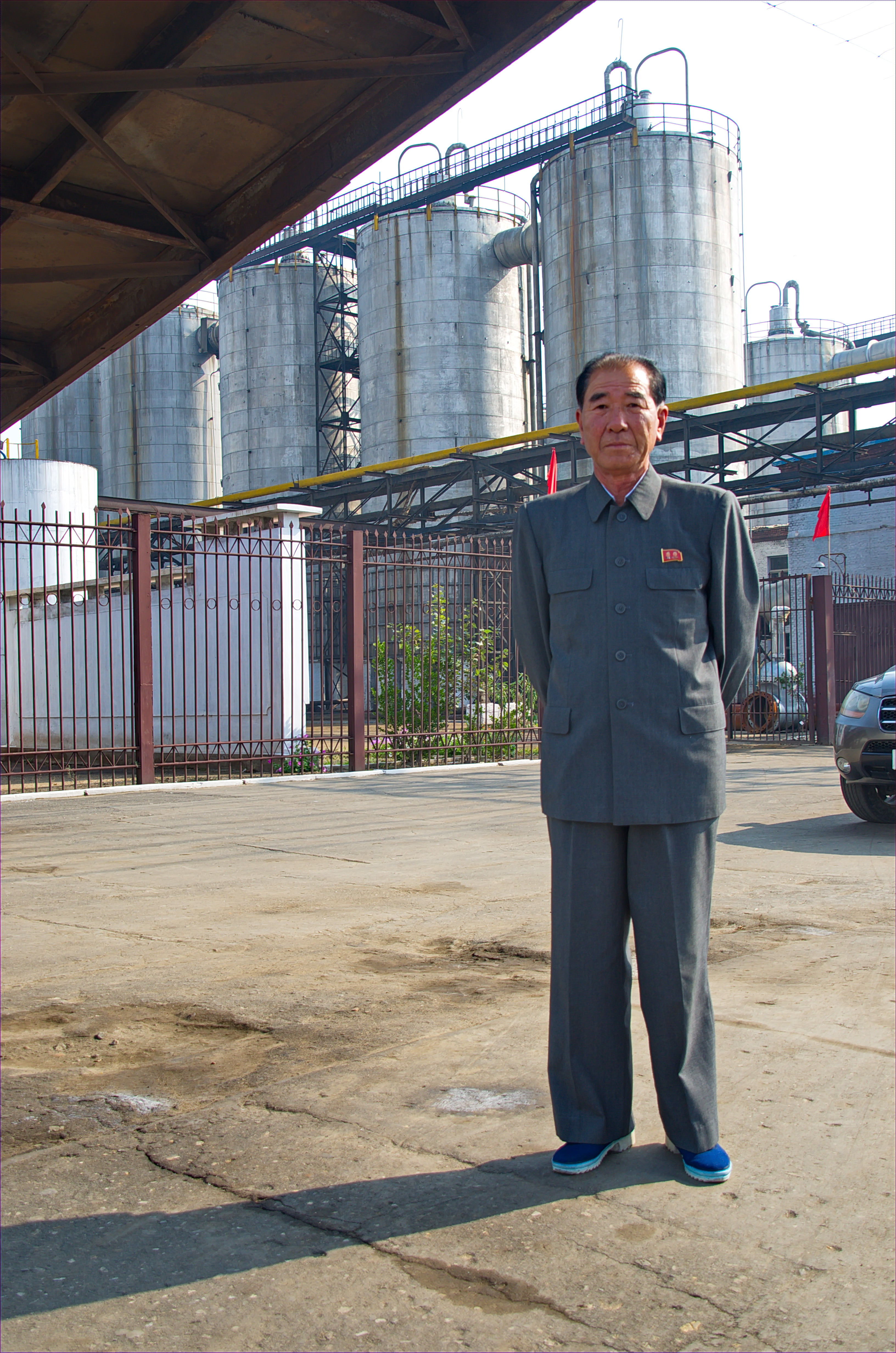 Nordkorea 2015 - Hamhung - Düngemittelfabrik